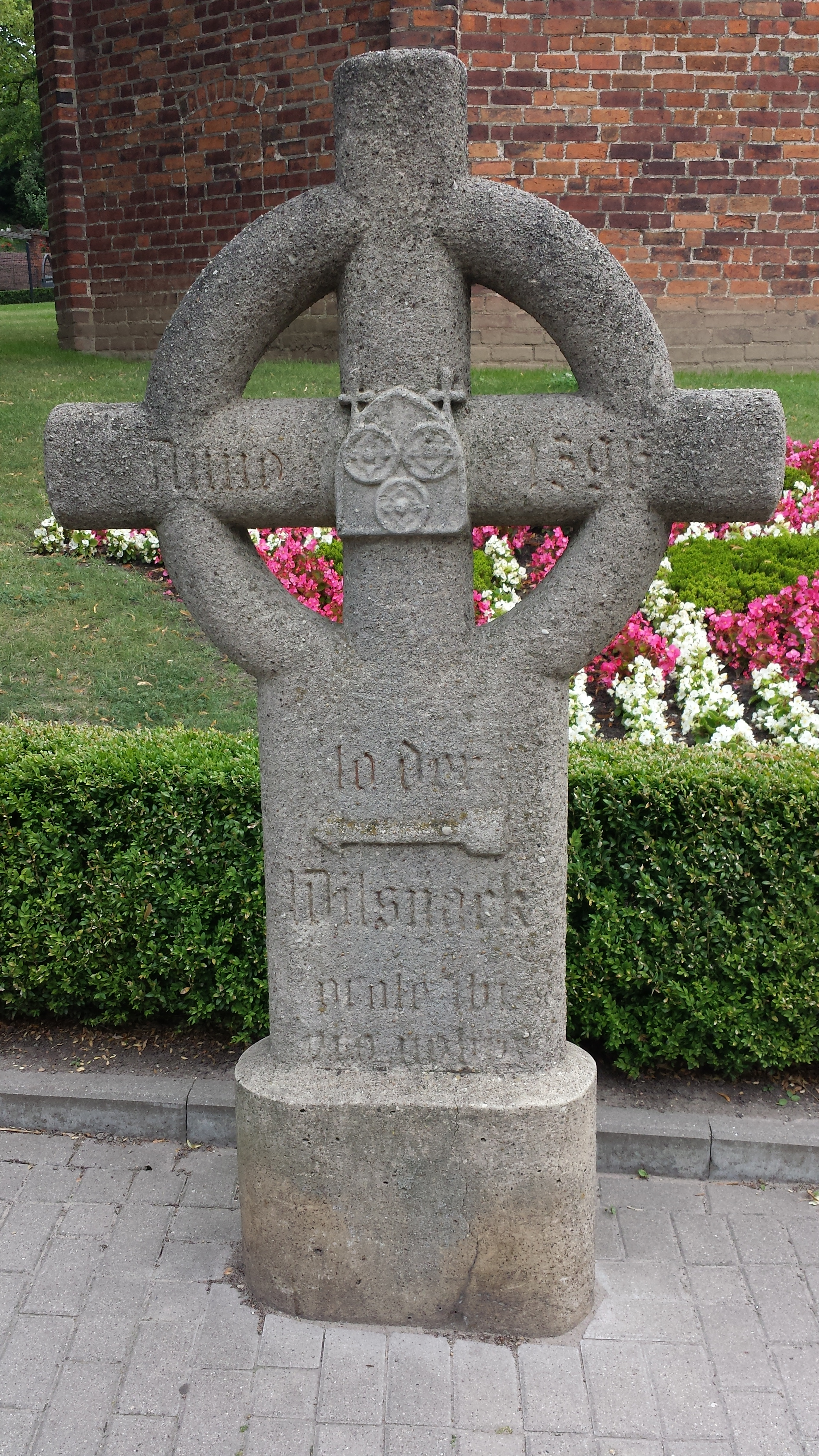 Wegekreuz in Havelberg unterhalb der St. Annen-Kapelle, das Pilgern den Weg zur Wunderblutkirche in Bad Wilsnack wies.